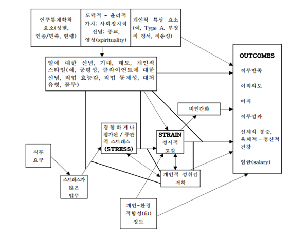 SSO모형